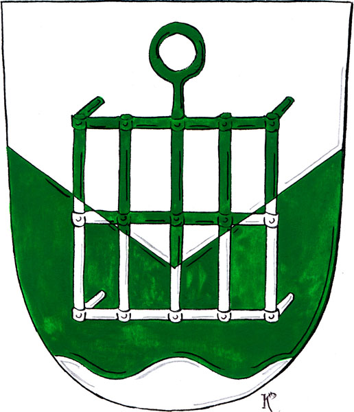 Znak obce Rokle v okrese Chomutov